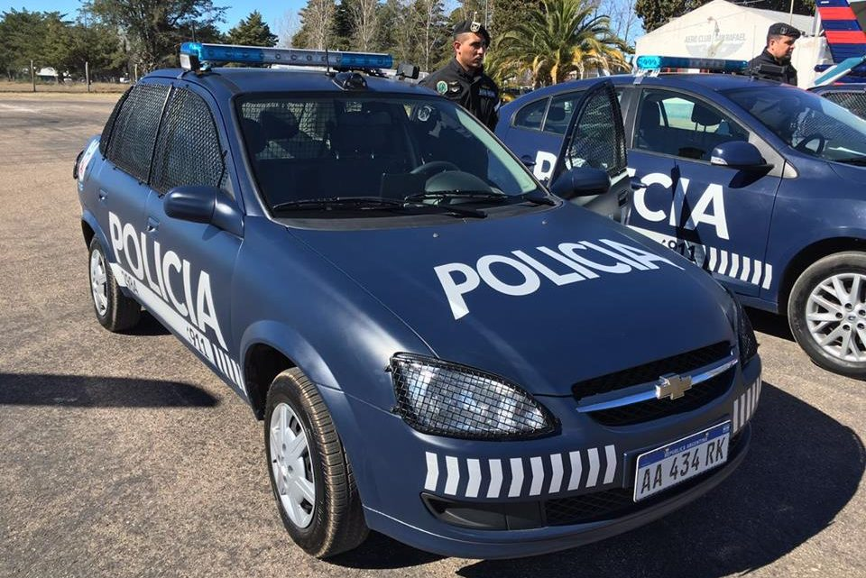 Patrullero de la provincia de Mendoza, Argentina